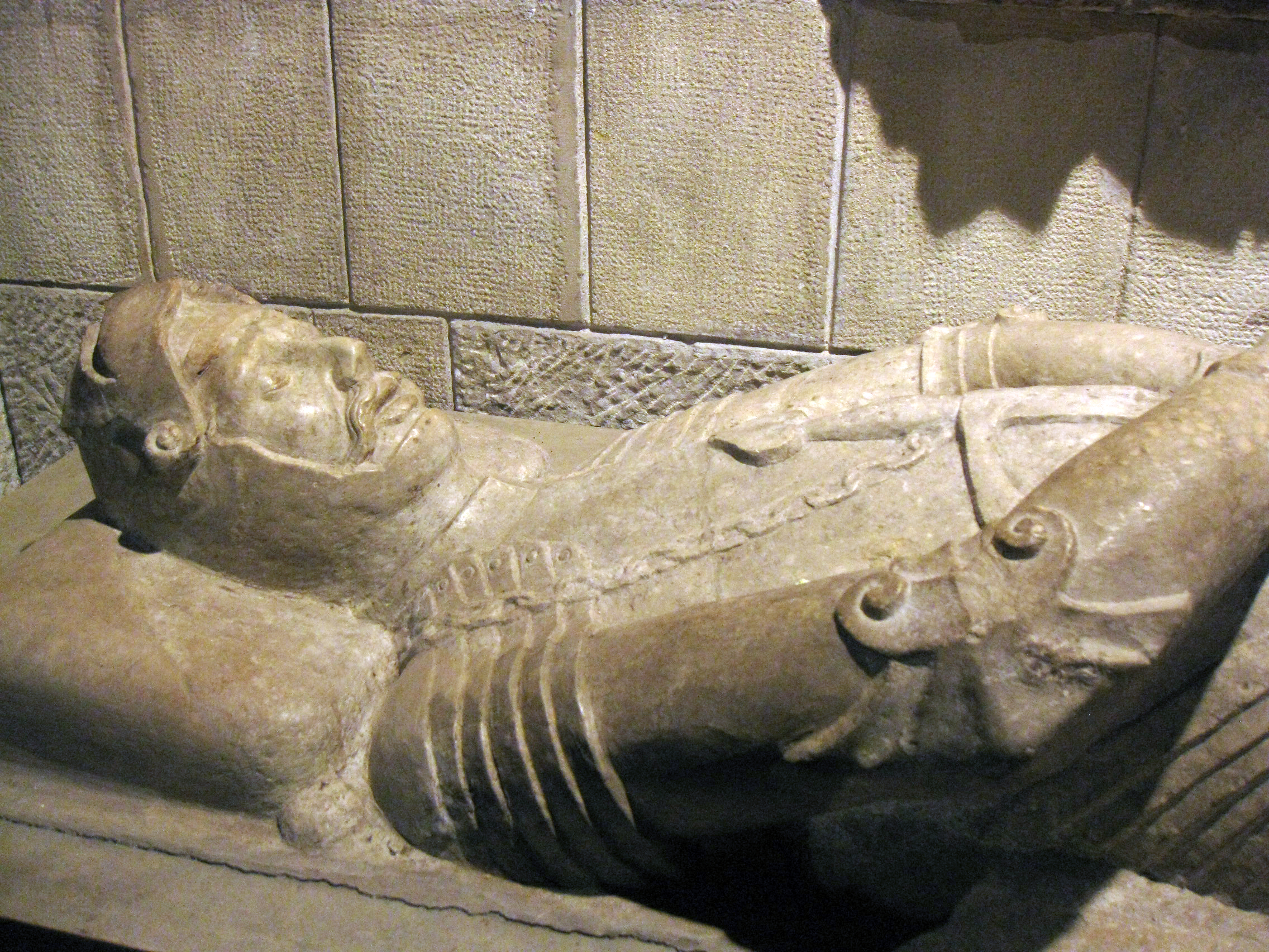 Sepulcre del cavaller Miquel de Boera a l'església romànica de Santa Anna, a Barcelona